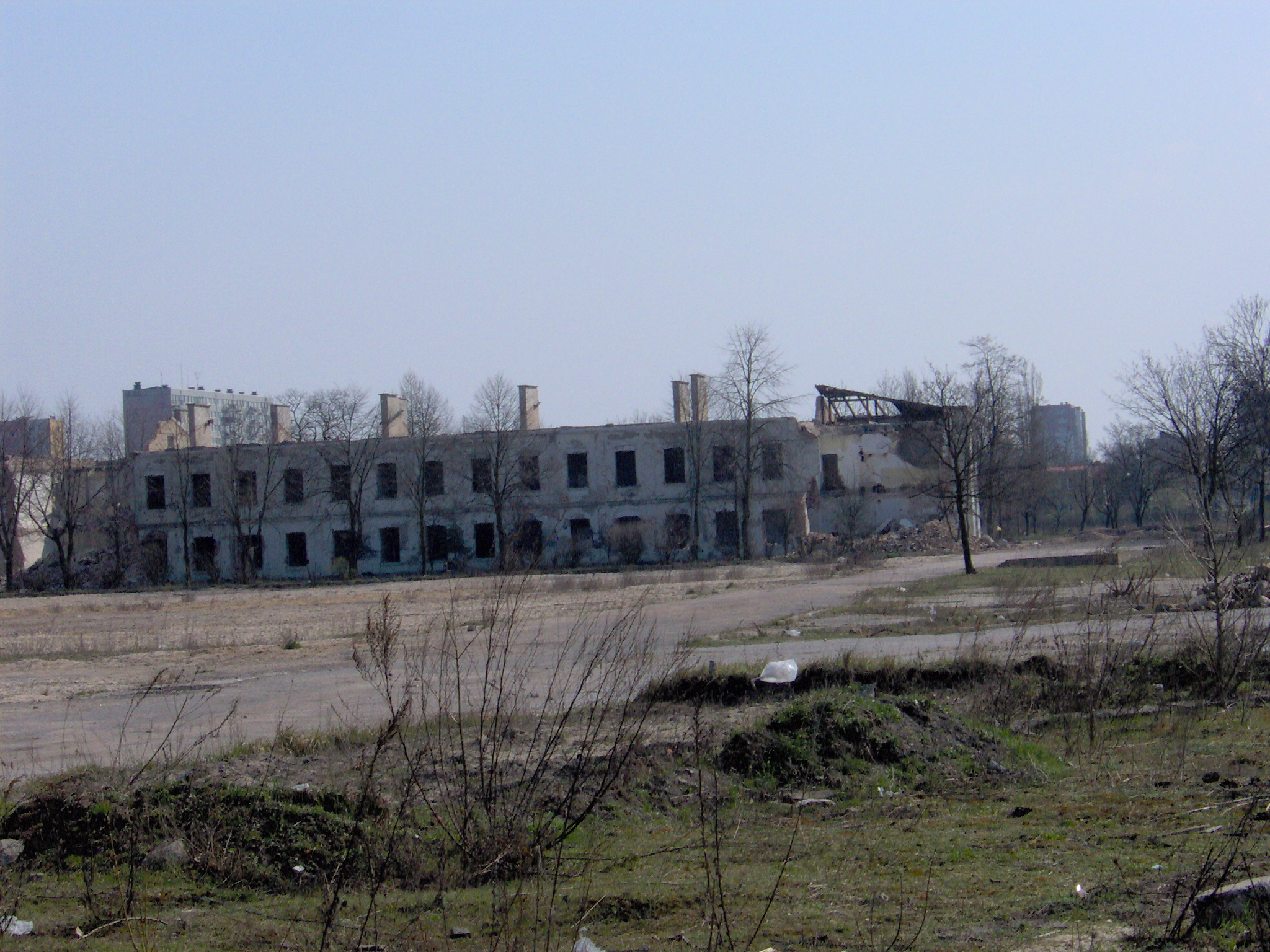 Pozostałości po byłej jednostki wojskowej przy ul. Żytniej 83 (2007 r.)